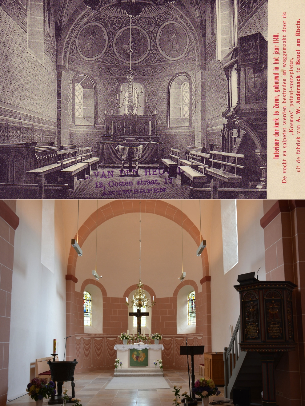 St. Viti Kirche Zeven